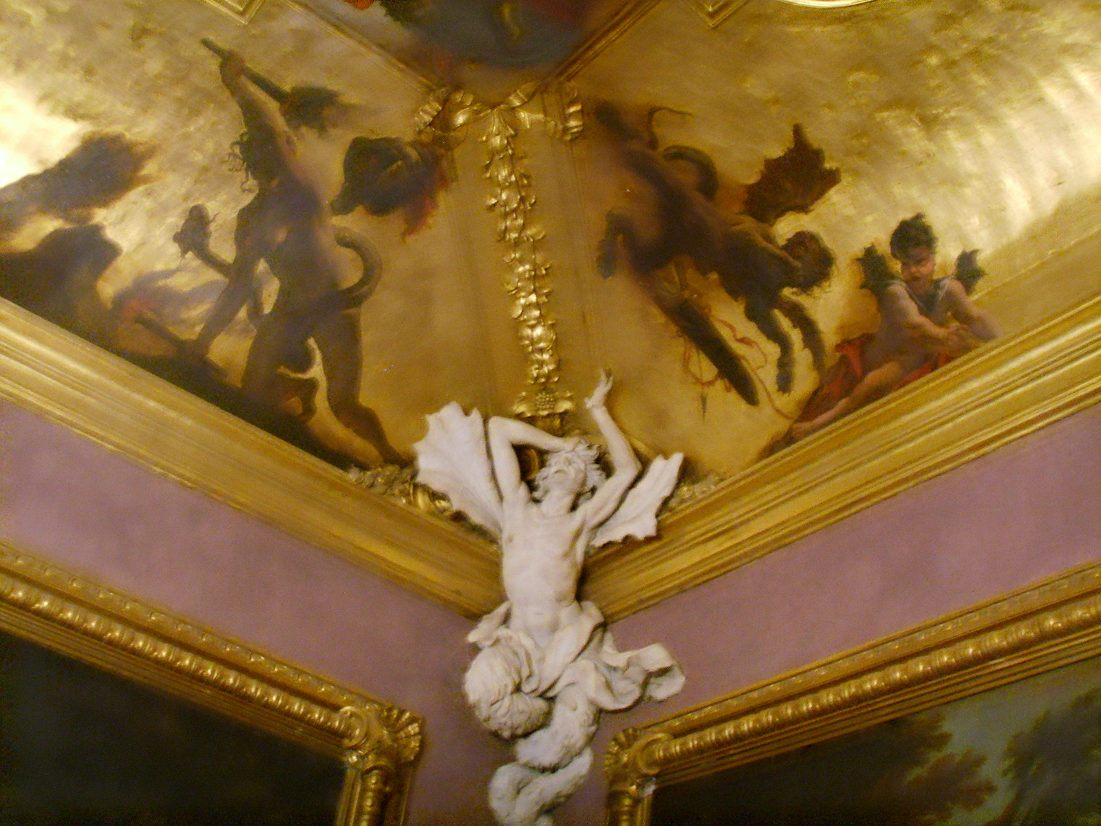 Palazzo fenzi, sala 3, diavolo 1 in stucco